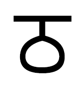 тхуттха